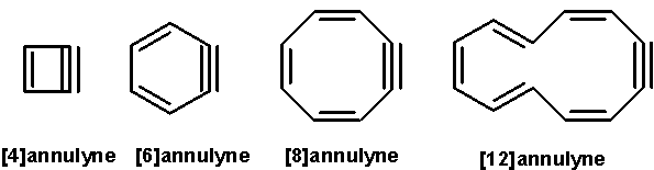 File:Annulyne.png